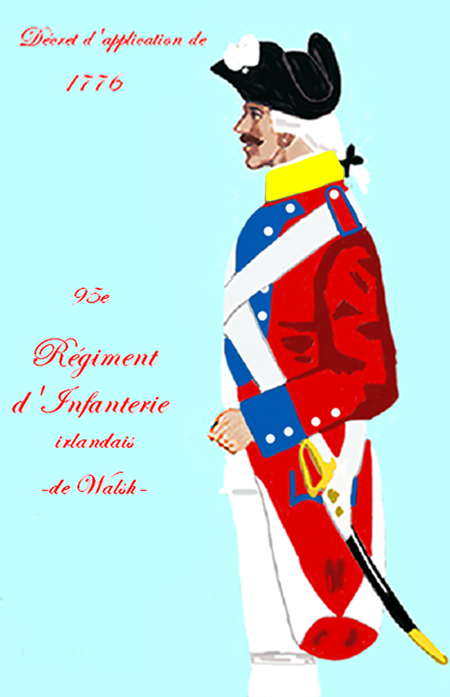 Uniform of a royal french infantry regiment between 1776 and 1791. Taken from: „LES UNIFORMES ET LES DRAPEAUX DE L'ARMÉE DU ROI“ Marseille 1899.